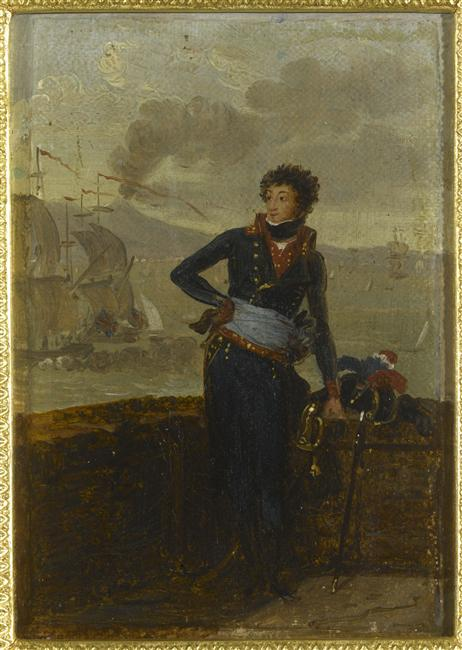 Portrait de Victor Léopold Berthier (1770-1807), général de division en 1799, présenté devant la baie de Naples, alors chef d'état-major de l'armée française à Naples.